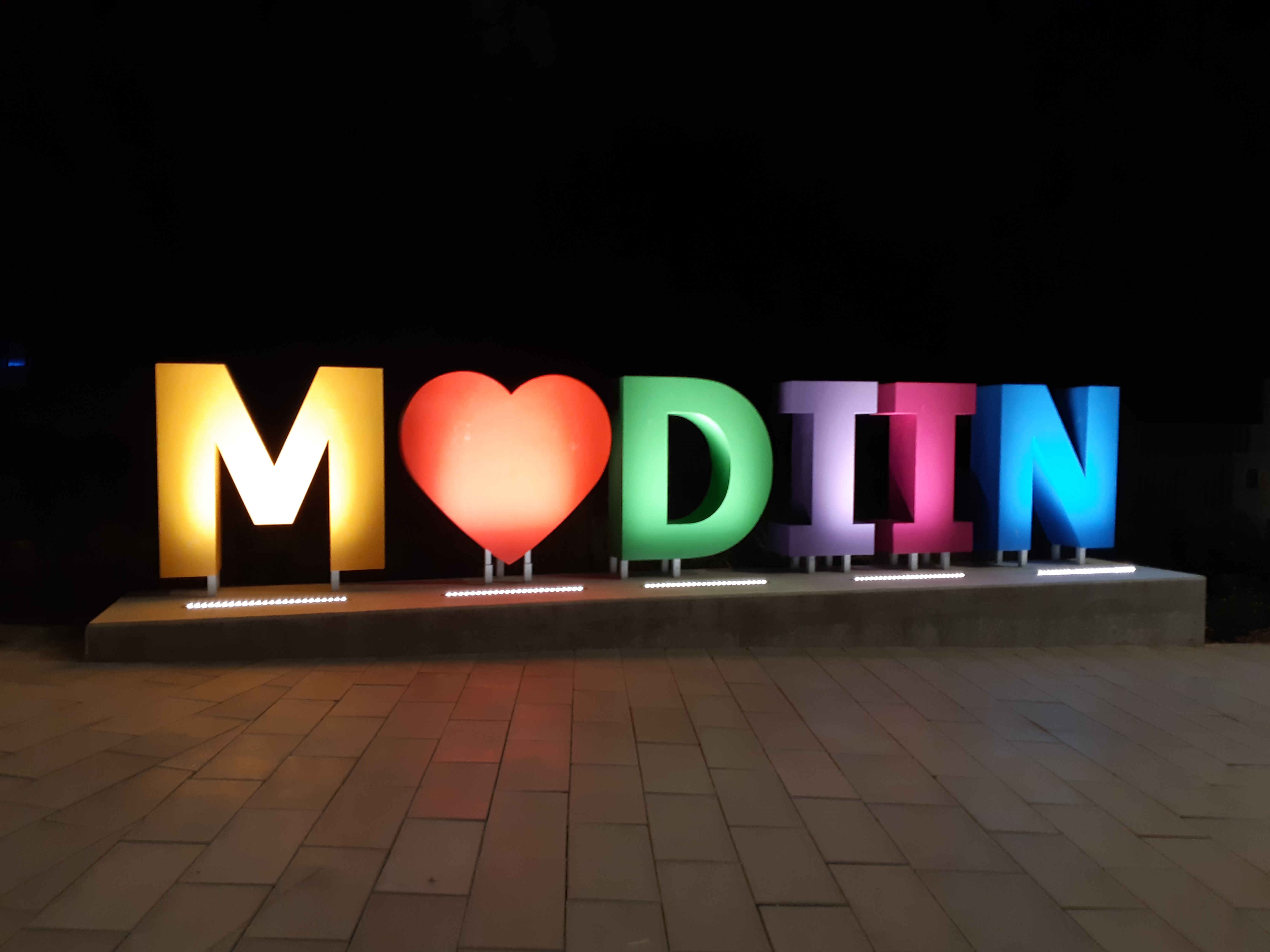 כניסה הצפונית לטיילת דם המכבים